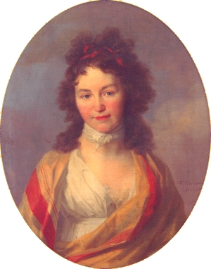 Portrait of Caroline Schlegel (1763-1809)